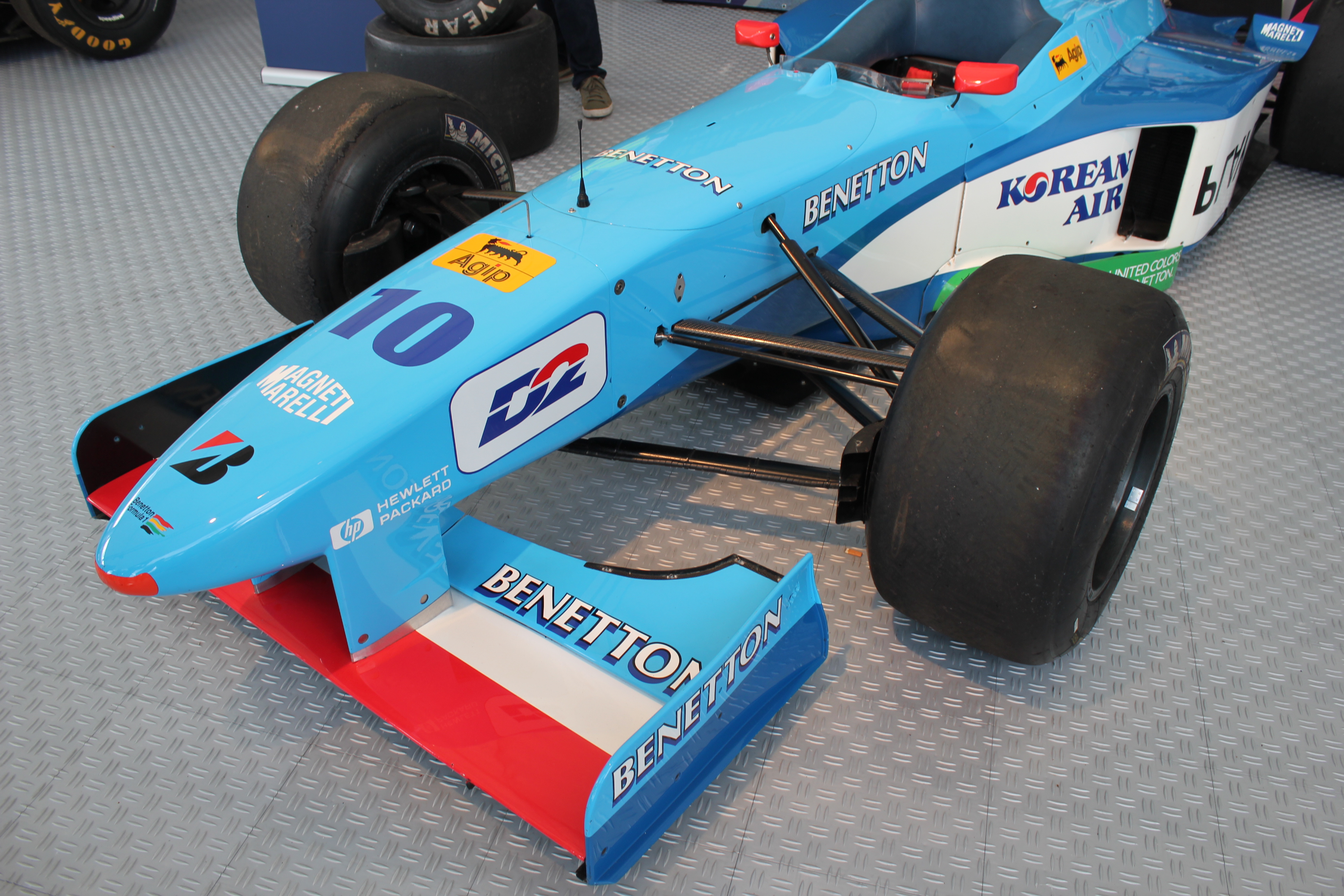 Der Frontflügel eines Benetton B198